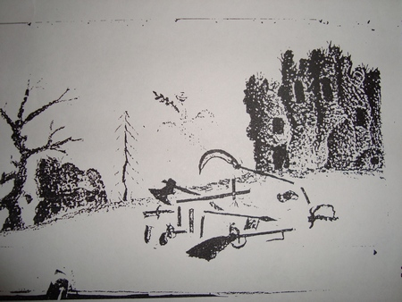 Малюнак Тамаша Грыневіча